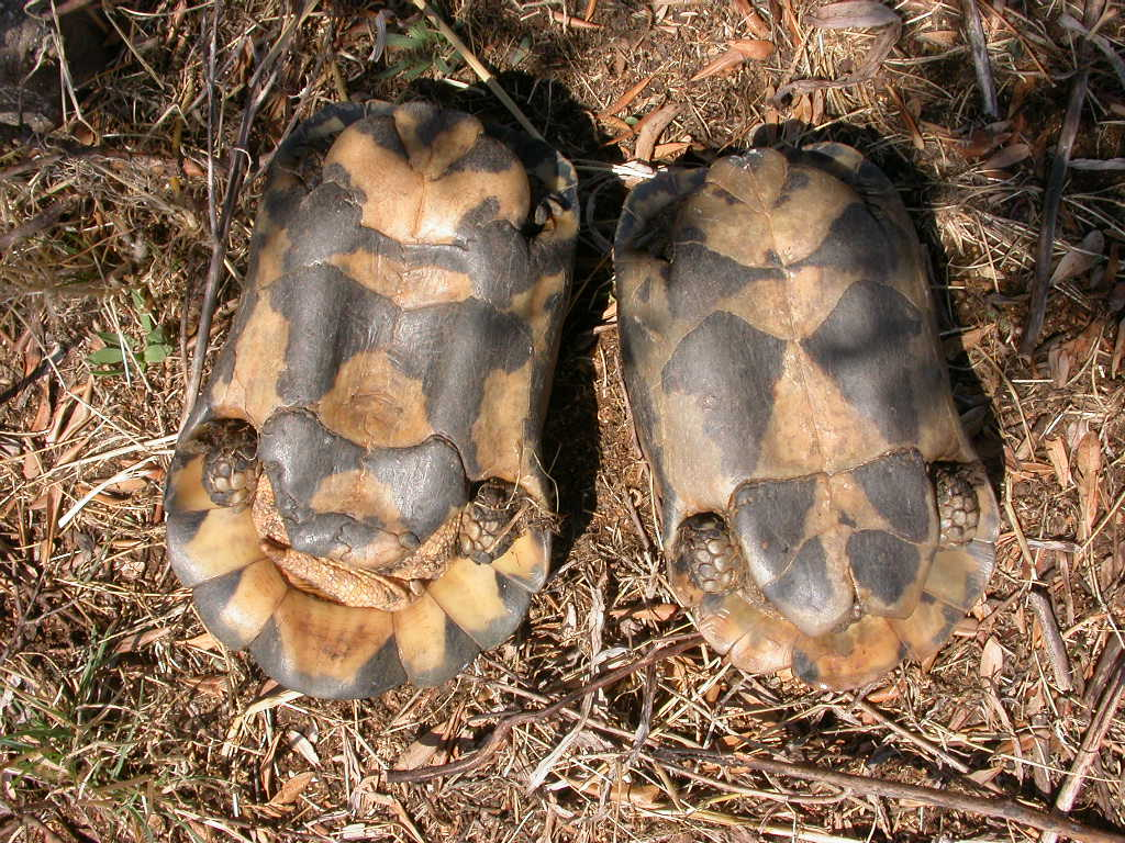 Testudo_marginata,_coppia,_dintorni_di_Parga,_Grecia,_agosto_2006